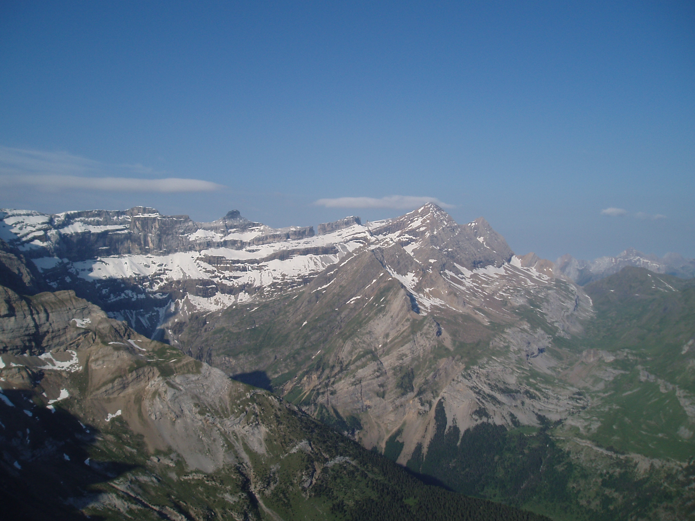 Cirque de Gavarnie, Photograph taken by Ian Grant, June 2005. 2272x1704. JPEG.